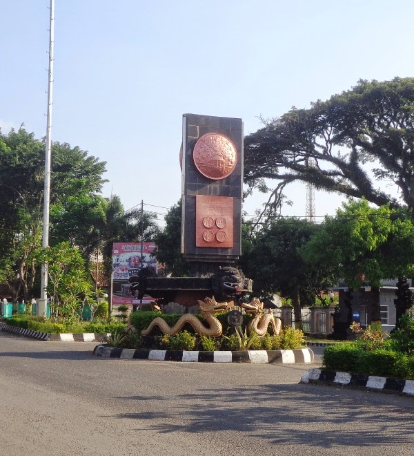 Tugu Adipura Blora